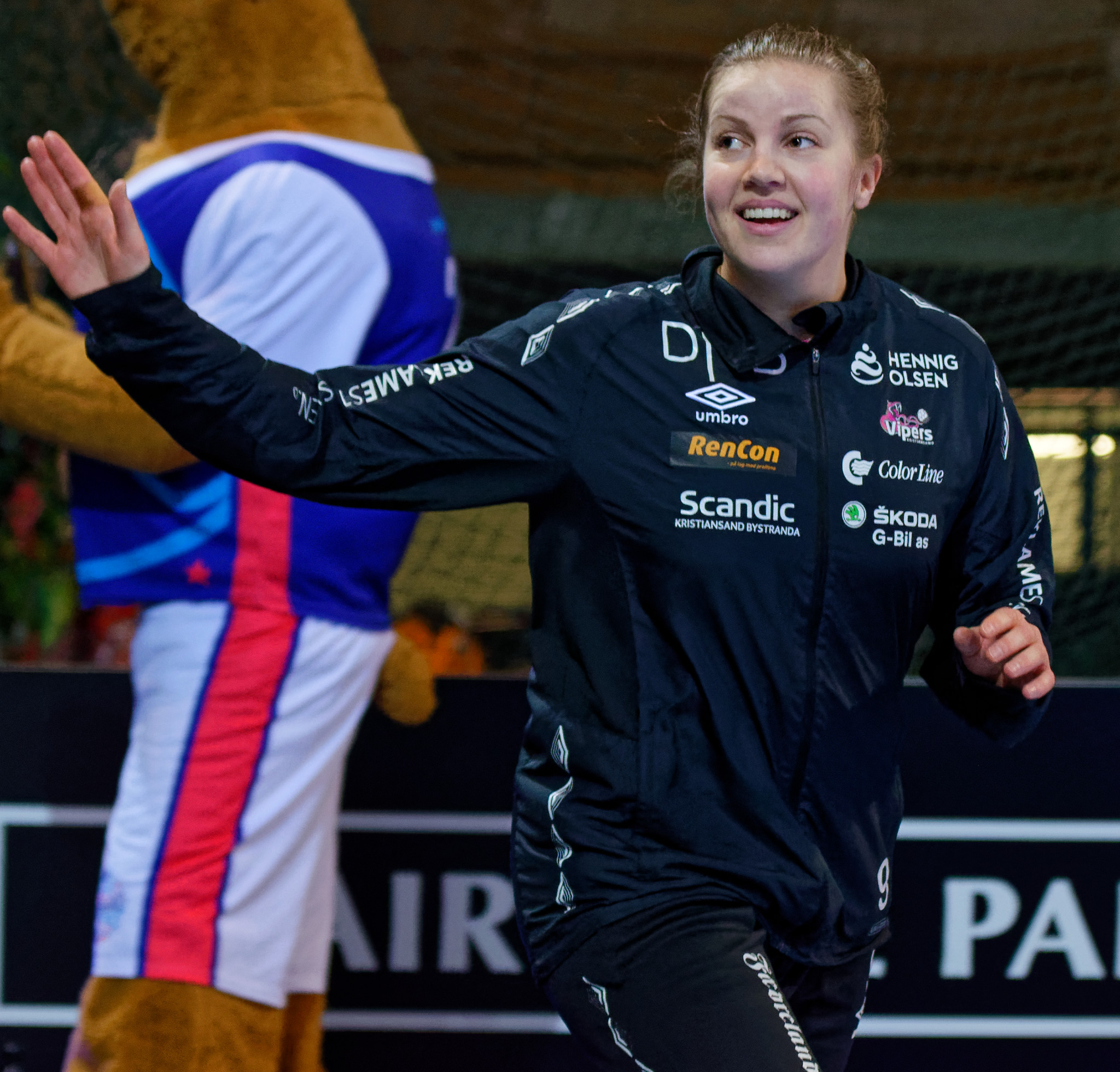 Rencontre du tour principal de coupe EHF entre Issy Paris Hand et les norvégiennes de Vipers Kristiansand au vélodrome de Saint-Quentin en Yvelines, le 03 février 2018.